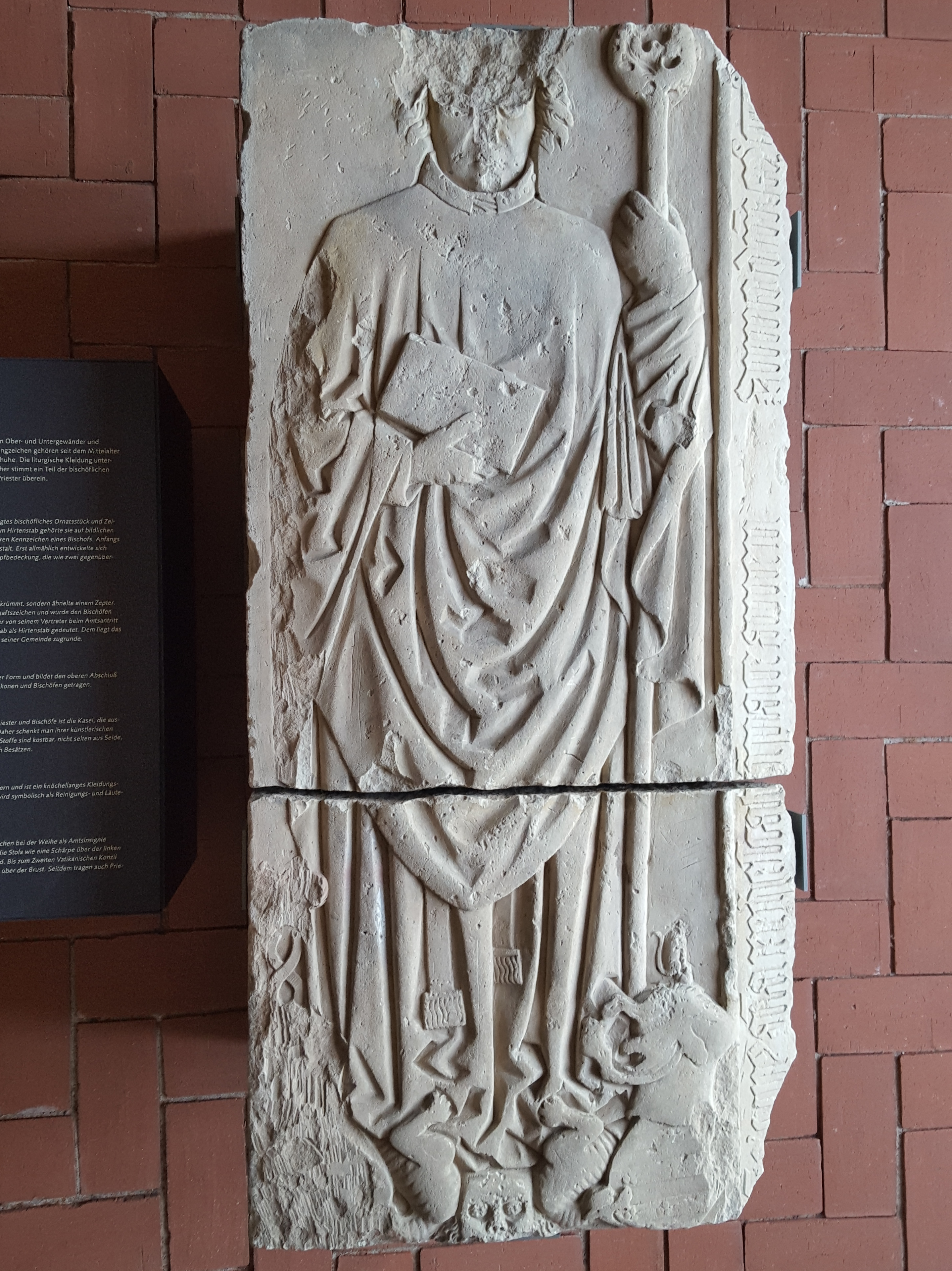 Grabplatte des Brandenburgischen Bischofs Dietrich von Stechow, Museum für brandenburgische Kirchen- und Kulturgeschichte des Mittelalters in Ziesar, Künstler unbekannt